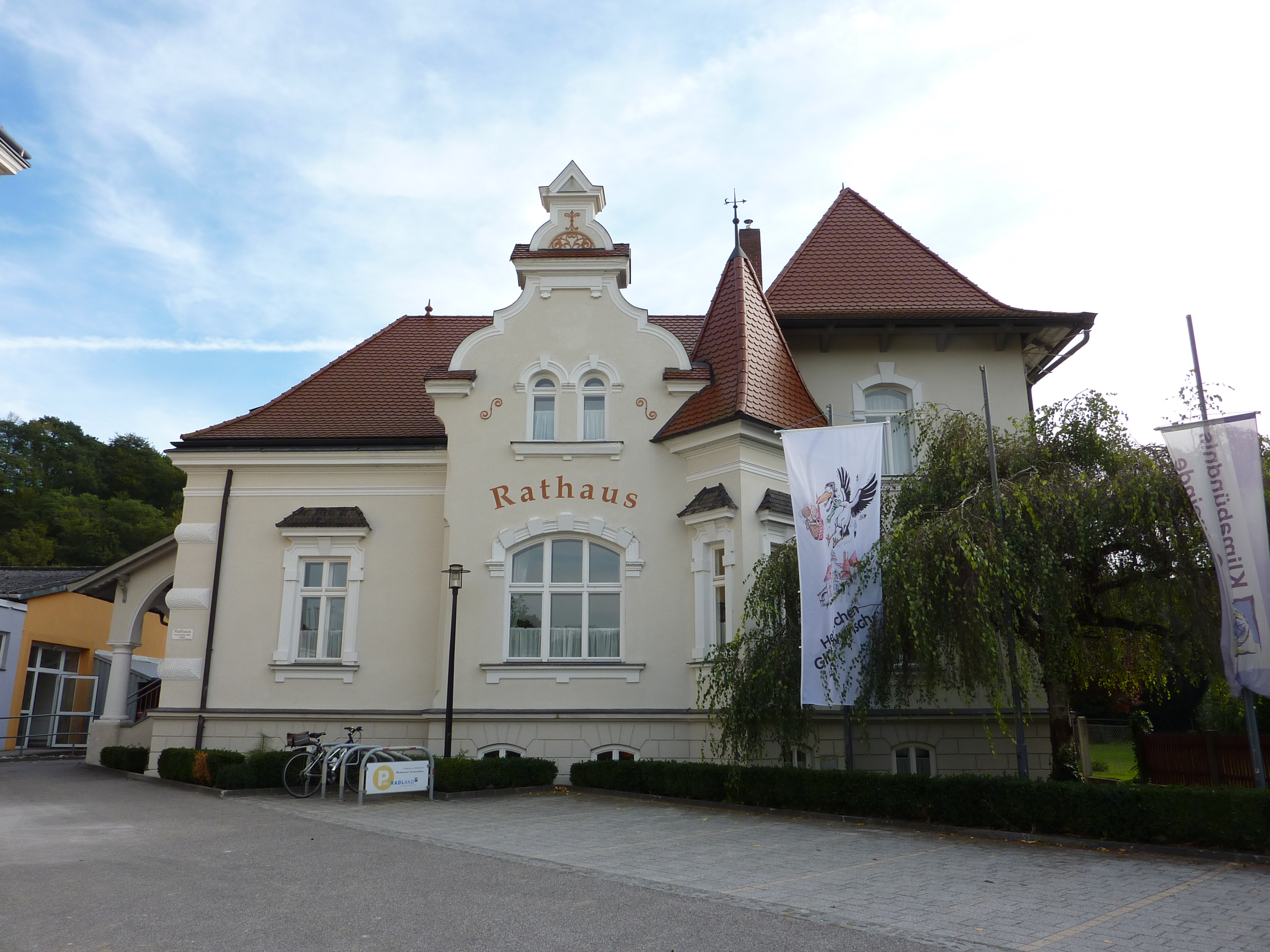 Rathaus, urspr. Villa Podruschka, Krummnußbaum, Niederösterreich